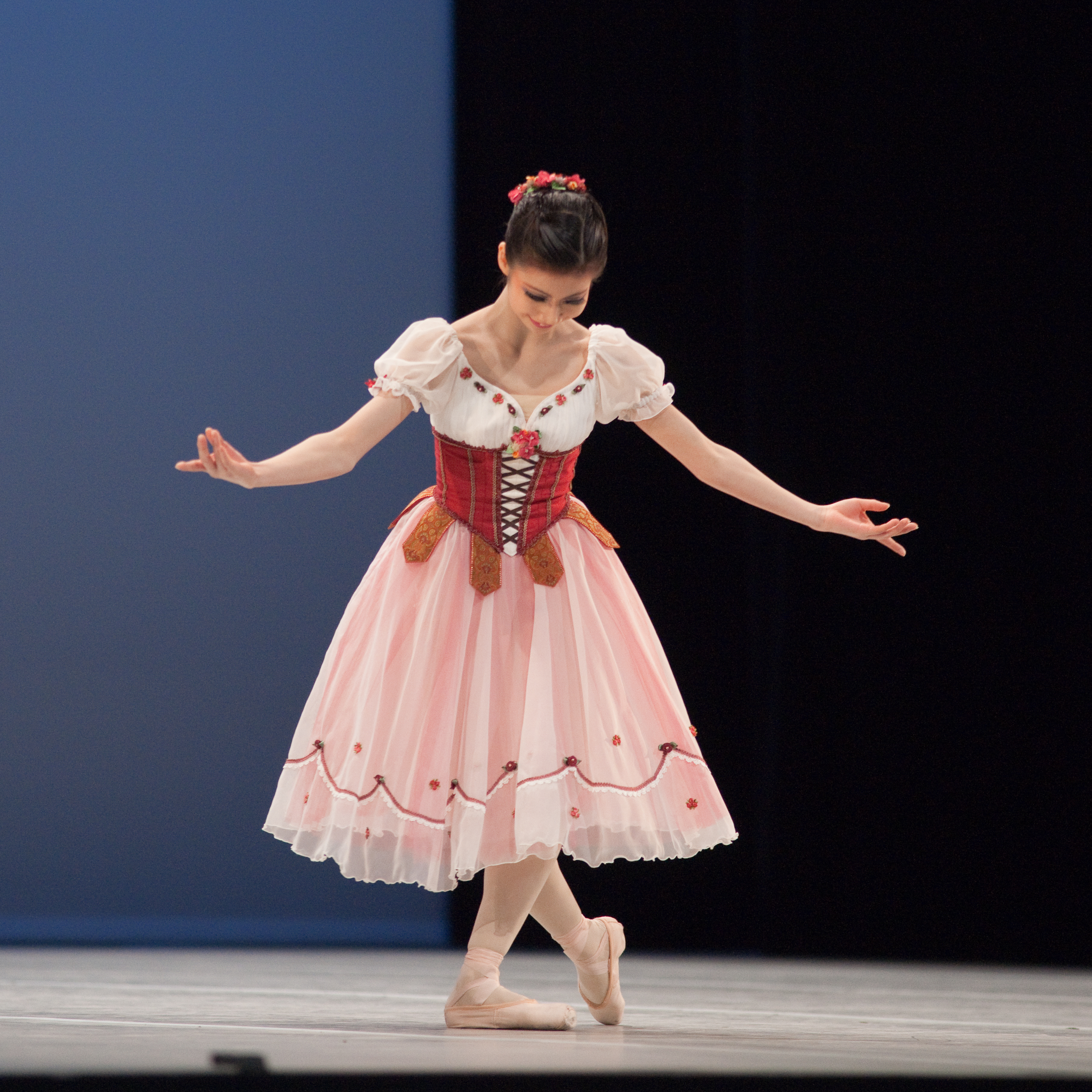 Variation extraite de Coppélia au Prix de Lausanne 2010.